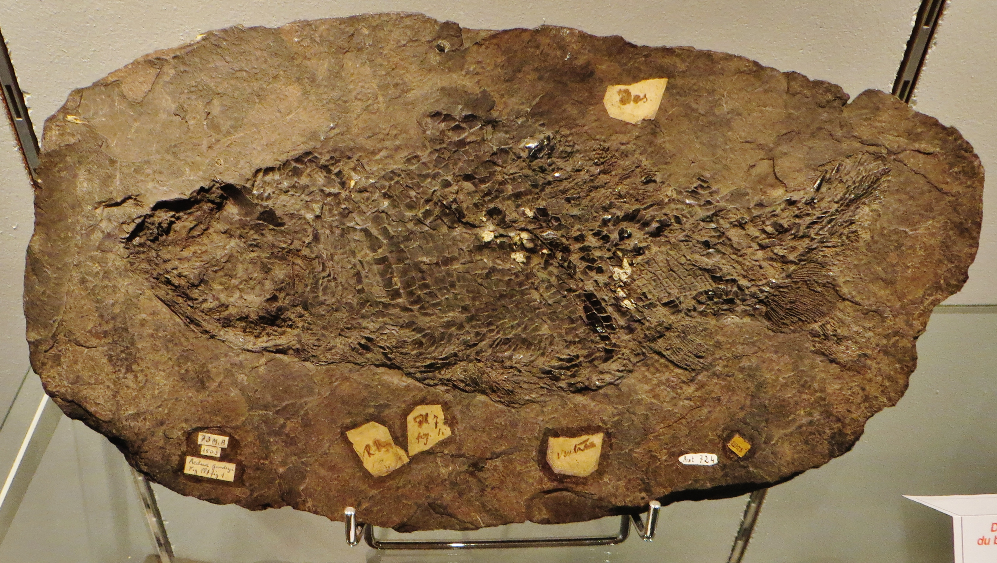 Fossil - Took the picture at Museum of Natural History, Autun